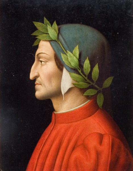 Ambito culturale: ambito lombardo. Descrizione: Il personaggio è raffigurato a mezzo busto, di profilo, con veste rossa e collo alto profilato di bianco, copricapo verde su cui posa una corona d'alloro con foglie verde pallido. Notizie storico-critiche: La tavoletta fa parte di una serie di quattro raffiguranti altrettanti poeti [...], che appartengono tutte evidentemente ad una stessa mano. Sul retro di una di esse si legge "attribuito ad Angelica Kaufmann". L'attribuzione dovrebbe stendersi anche al ritratto di Dante. L'autore però è piuttosto un modesto artista della prima metà del secolo XIX. L'opera fu trafugata insieme alle altre nel 1997 e venne recuperata l'anno successivo.